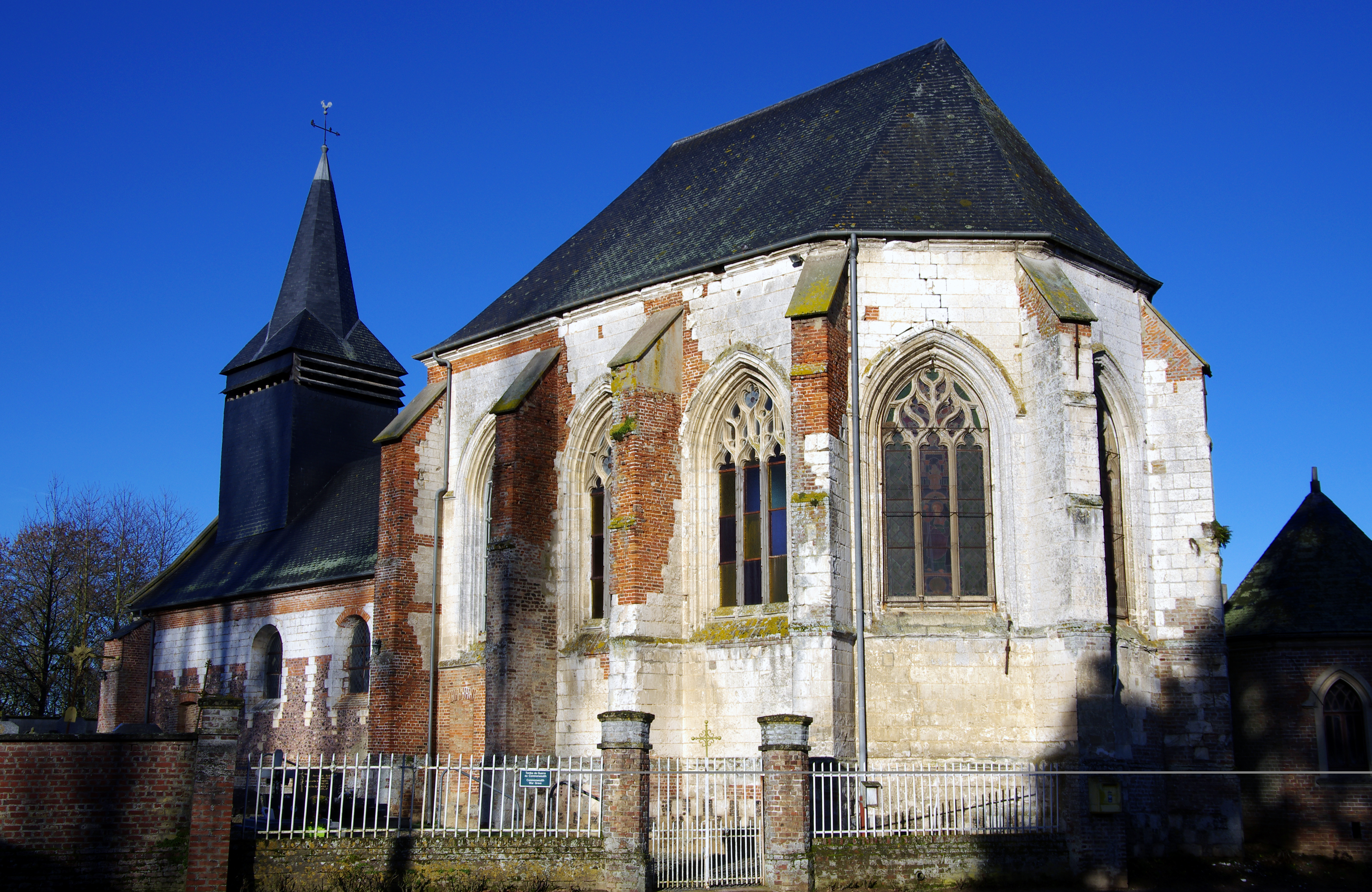 Ramburelles (Somme, France) - L'église.